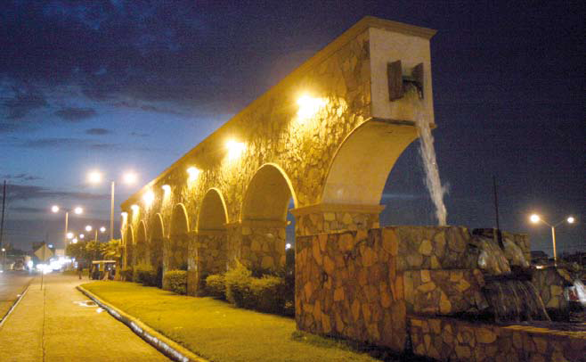 Una bella postal del acueducto en Saltillo, Coah., Mexico.